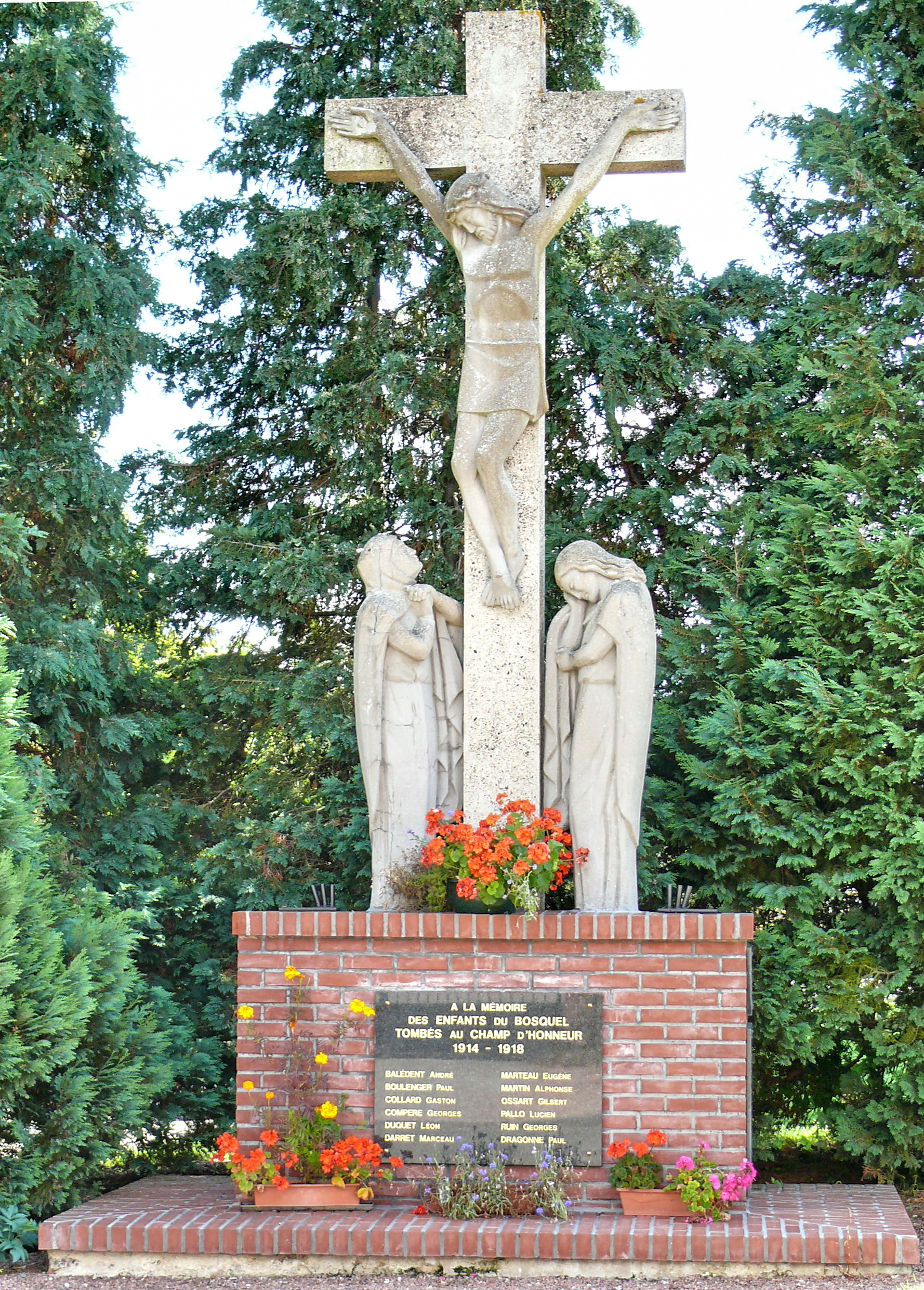 Bosquel (Somme - Picardie - Somme) : Le calvaire - monument aux morts